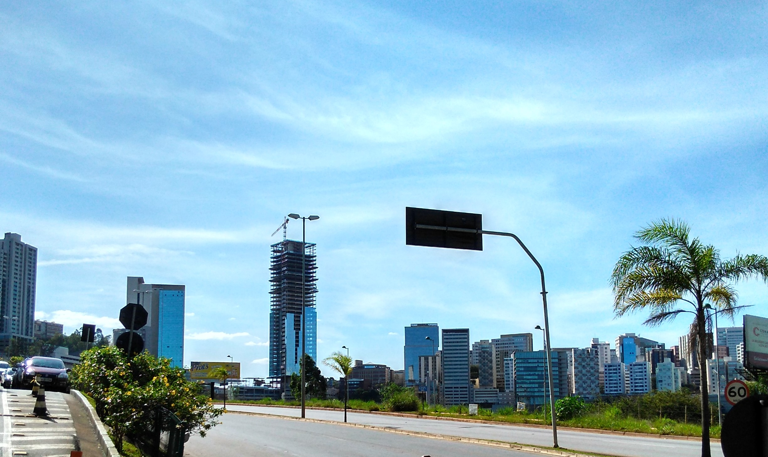 Skyline da região do Vila da Serra, em Nova Lima. À esquerda, as gêmeas Torres Icon e, ao centro, a construção do Concordia Corporate